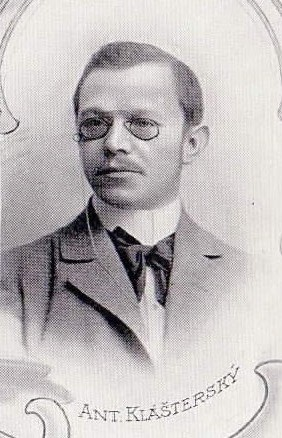 Antonín Klášterecký